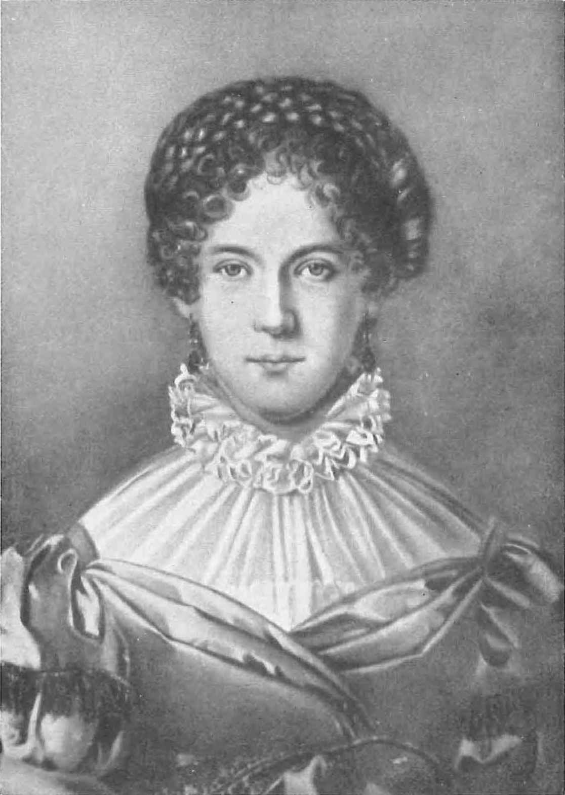 Gemälde, das Dorette Spohr zeigt